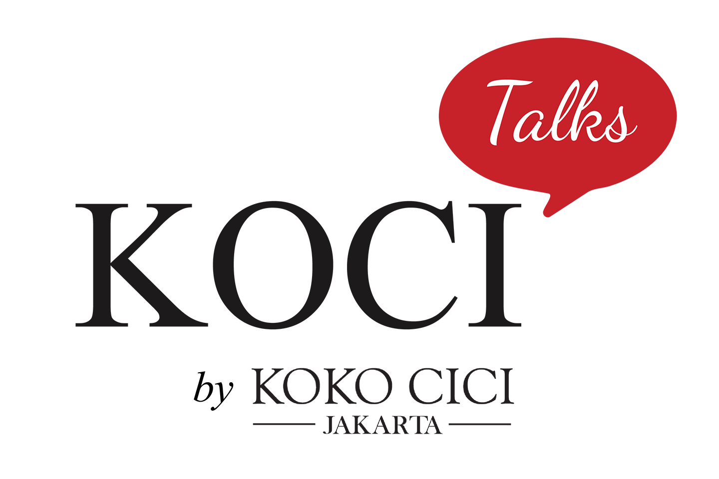 Logo Koci Talks